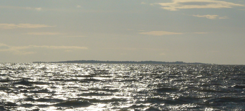 Sõmeri laid. Vaade Rohuküla sadamast.